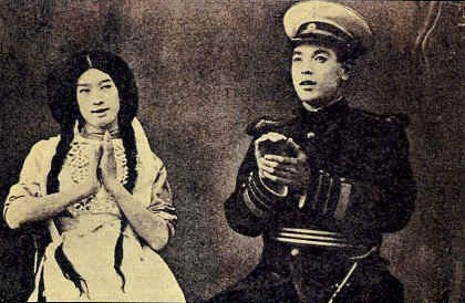 Katyusha (カチューシャ (映画))